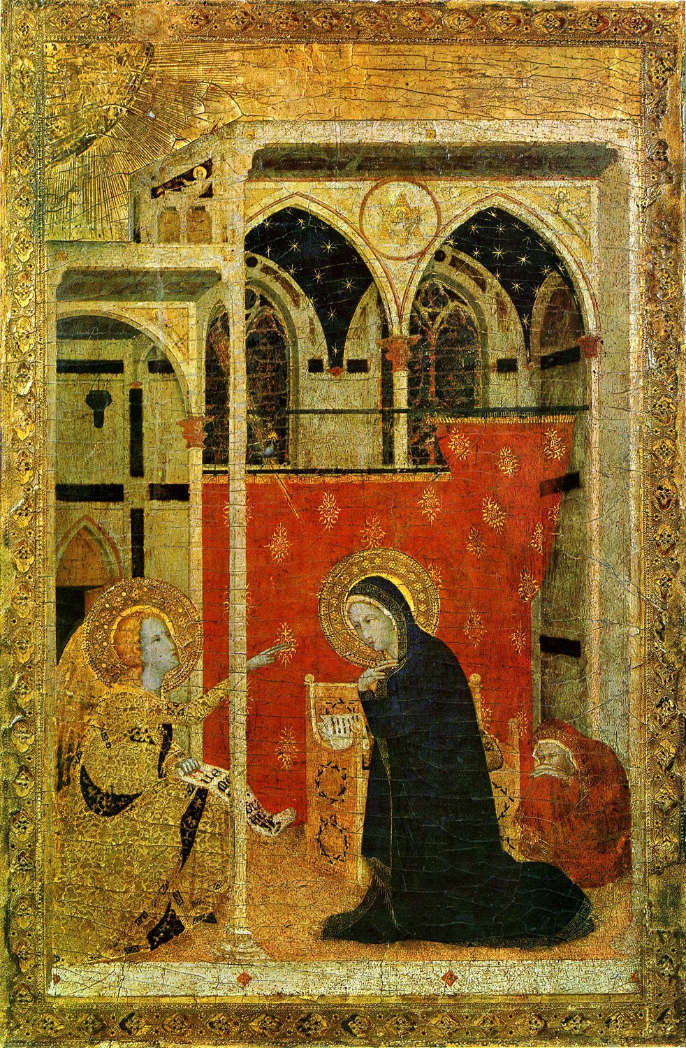 7_the-annunciation-_Х-к_из_Авиньона.14в.Экс_ан_Прованс,_Музей